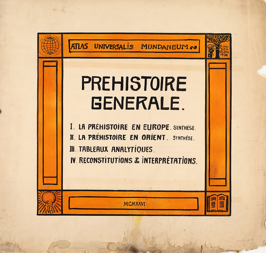 Planche de l'Atlas de la Préhistoire, appartenant à l'Encyclopaedia Universalis Mundaneum. Cette encyclopédie créée par Paul Otlet dans les années 20 se voulait d'un genre nouveau: des planches non reliées, standardisées dans leur format et leur présentation et assemblées pour former des Atlas sur des thématiques particulières